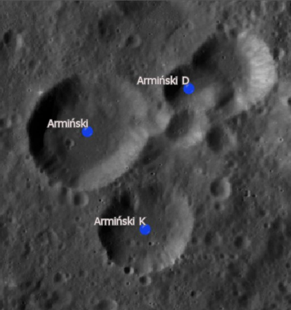 Cráter lunar Armiński. Cráteres satélite. (Imagen LRO)